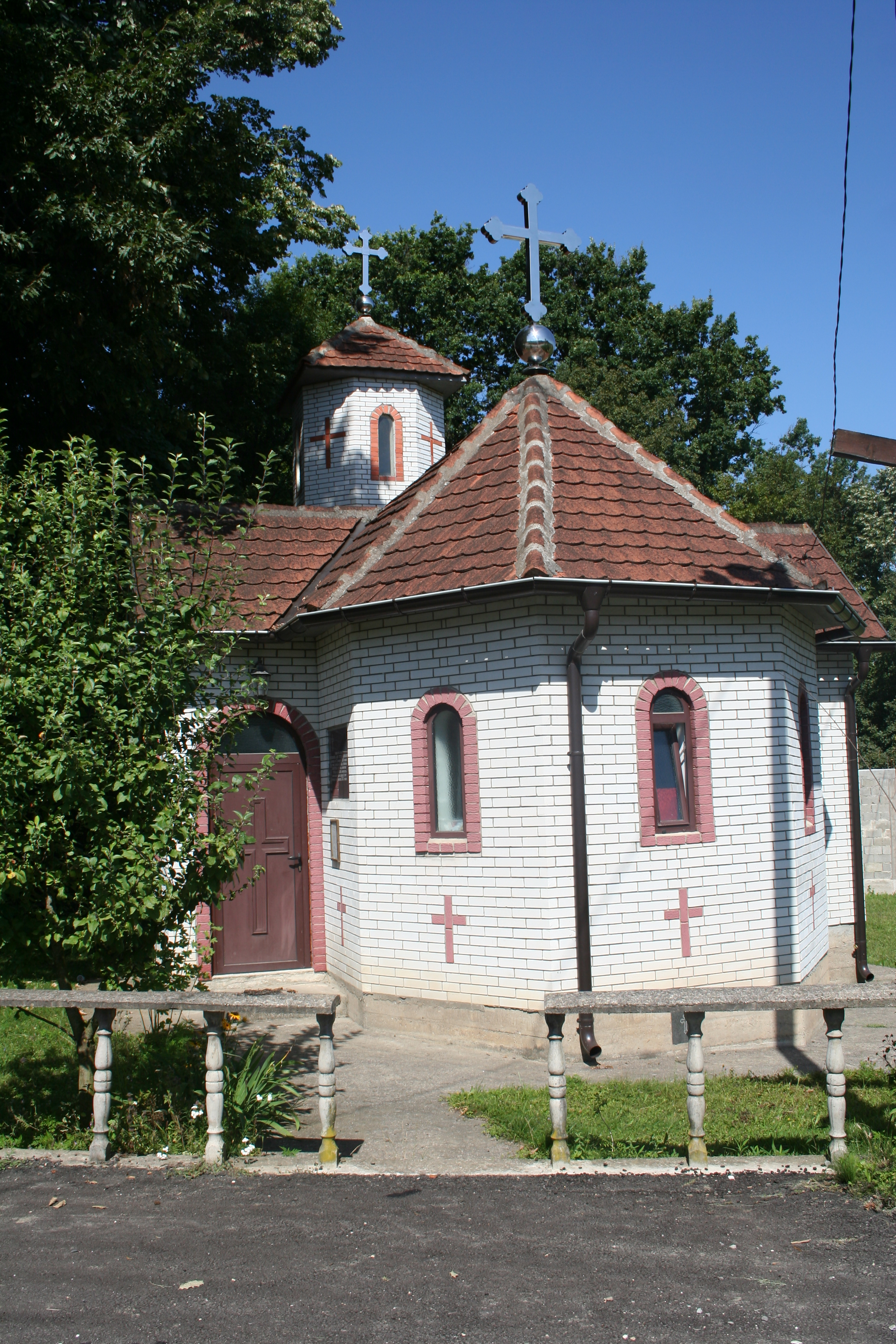 Crkva Sv. Justina filosofa, Ribarica